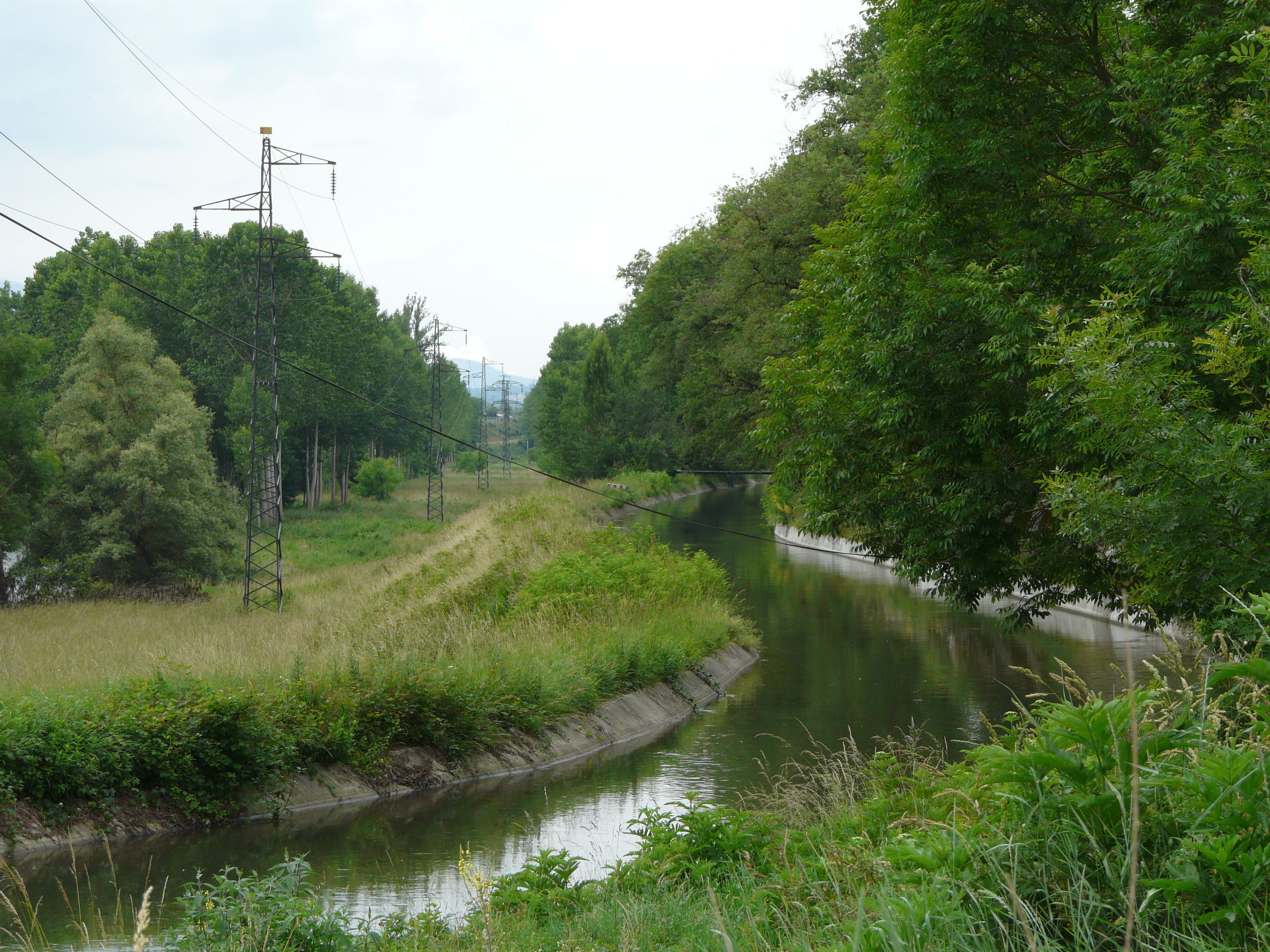 Le canal de Saint-Martory au sud de la commune de Mancioux, Haute-Garonne, France. Vue prise en direction de l'amont.